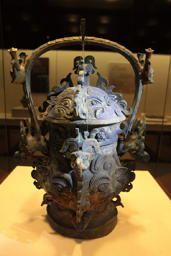 安居羊子山鄂国墓地出土的提梁㔽